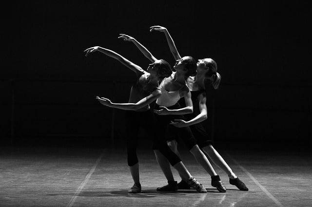 3 danseuse de l'école de danse de Nice